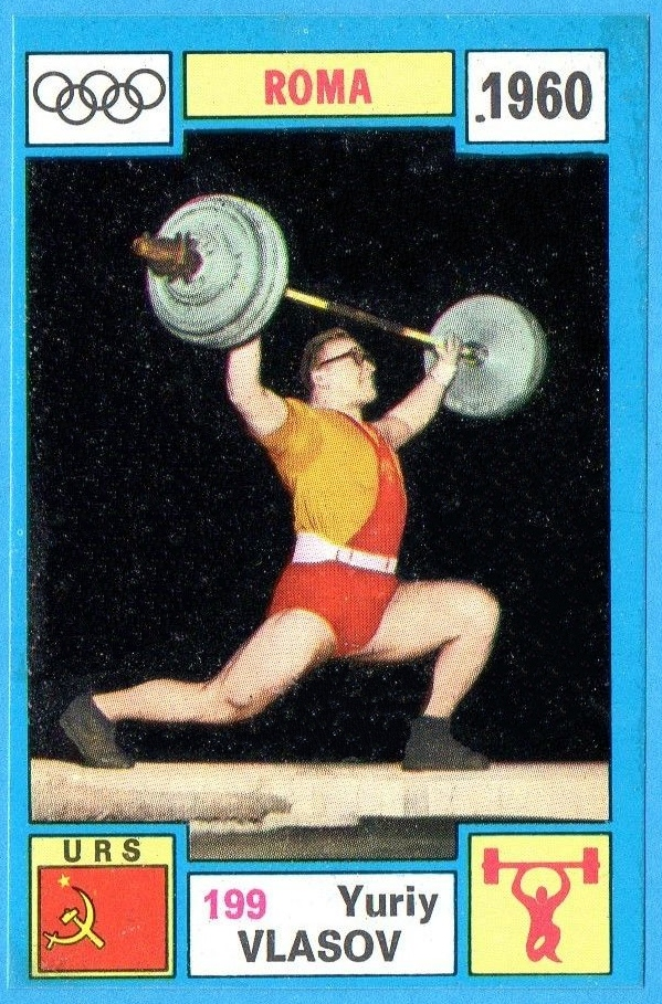 OLYMPIA 1896-1972-PANINI-Figurina ADESIVA !! n.199- VLASOV - URSS -Rec